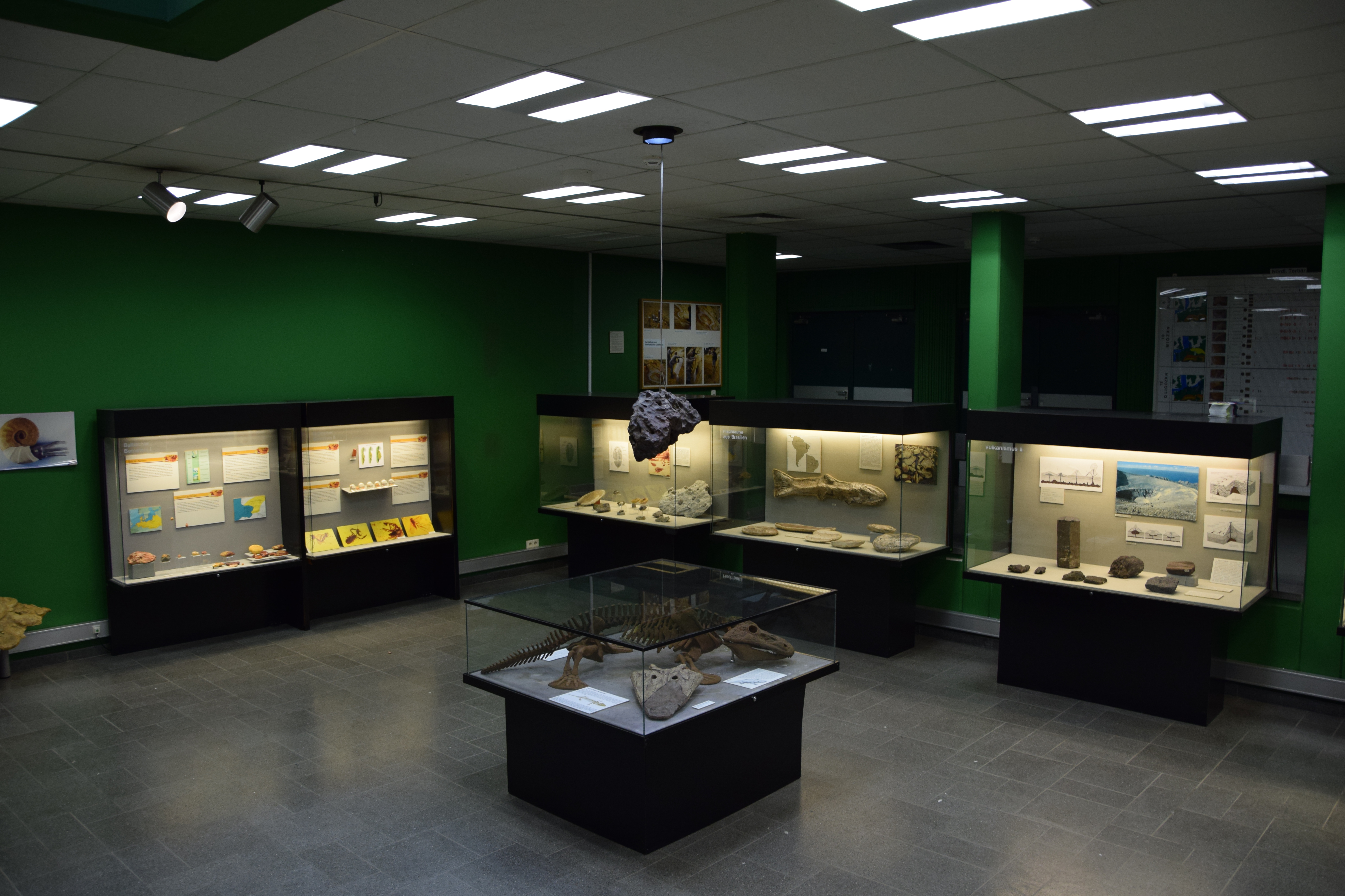 Geologisch-Paläontologisches Museum Hamburg